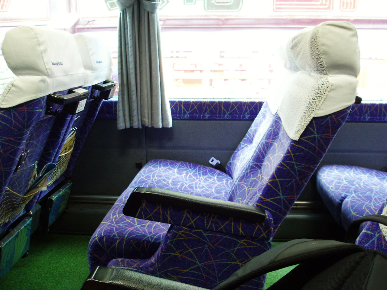 Yamanashi Kotsu Seat